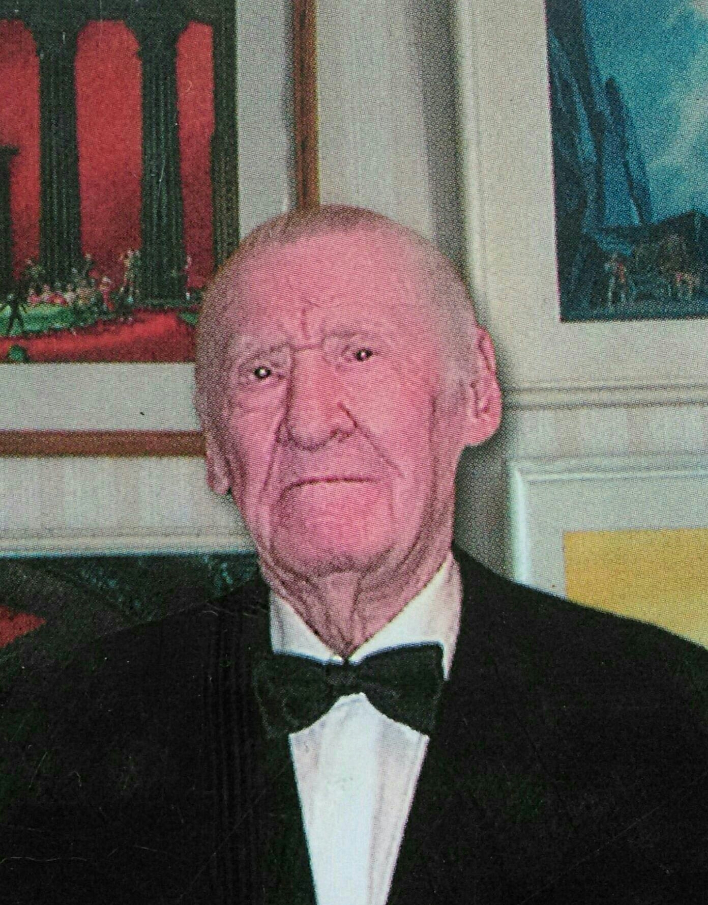 Евгений Чемодуров. Советский сценограф.